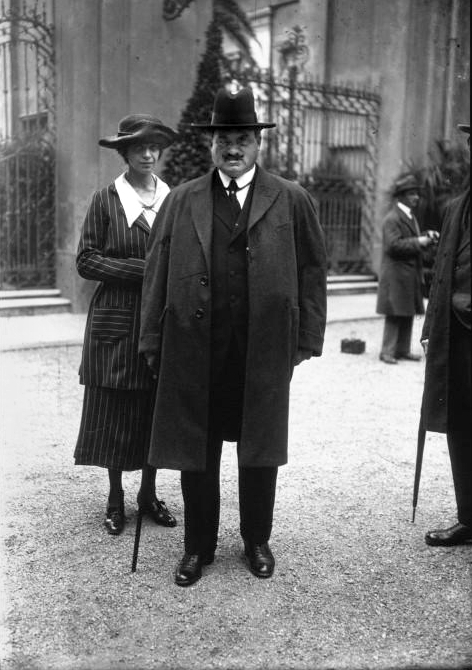 El primer ministro búlgaro, Alejandro Stamboliski, en la Conferencia de Génova en 1922.